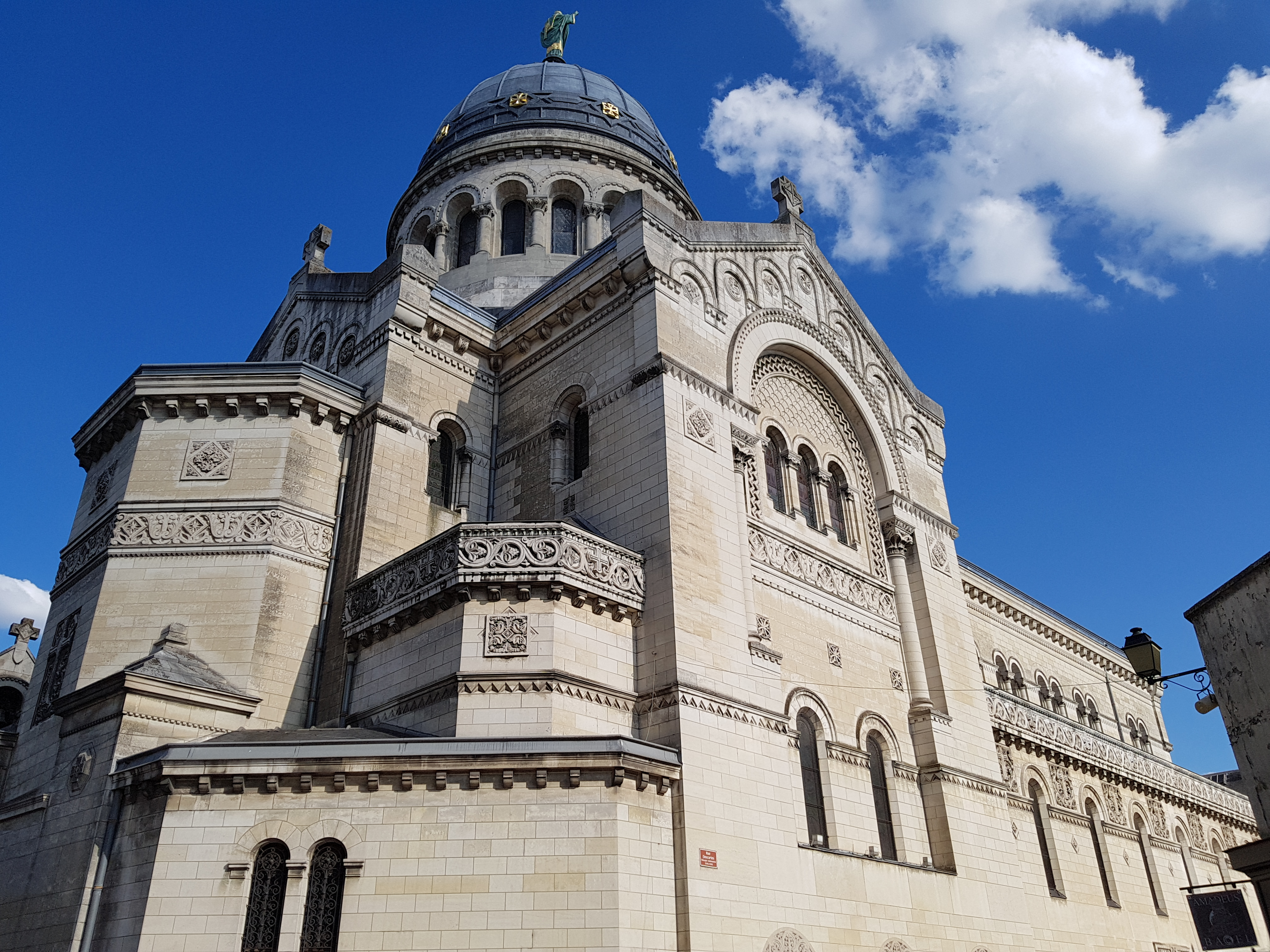 Vieux tours, nouvelle Basilique Saint-Martin XIXe siècle